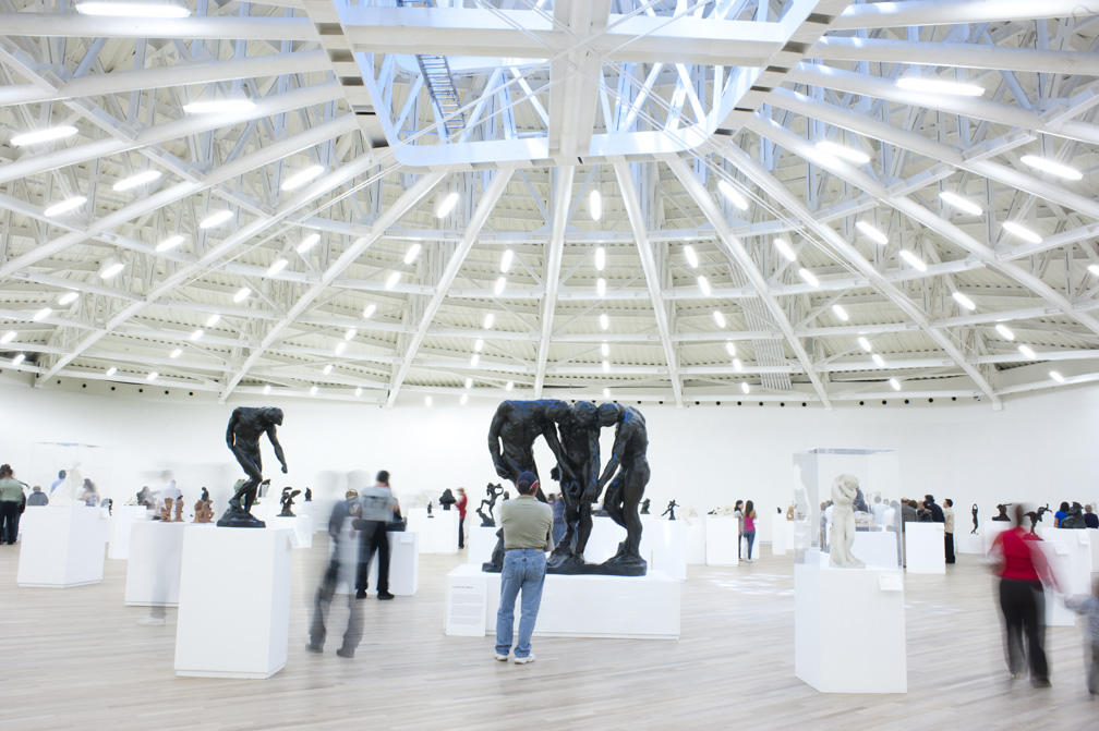 Interior of Museo Soumaya Plaza Carso in México, D. F. Credits FREE Fernando Romero EnterprisE photo by Adam Wiseman